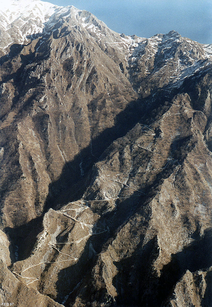 La Via Vandelli - è ben visibile la struttura a zig-zag del sentiero alle pendici del Monte Tambura (la cui vetta innevata non si vede, si troverebbe in corrispondenza della direzione alto - sinistra dell'immagine)